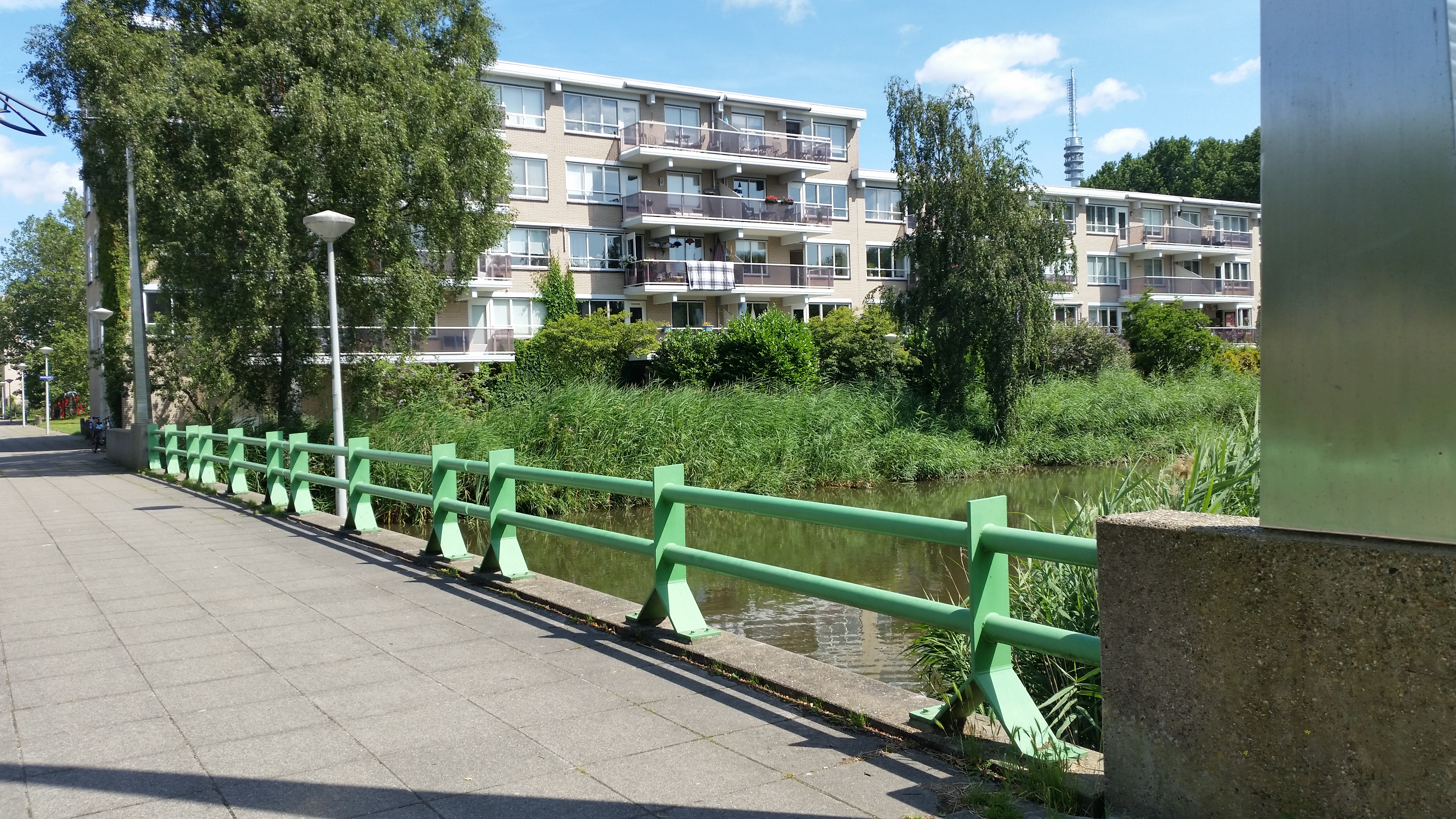 Leuning van Brug 1801 (in Amsterdam)